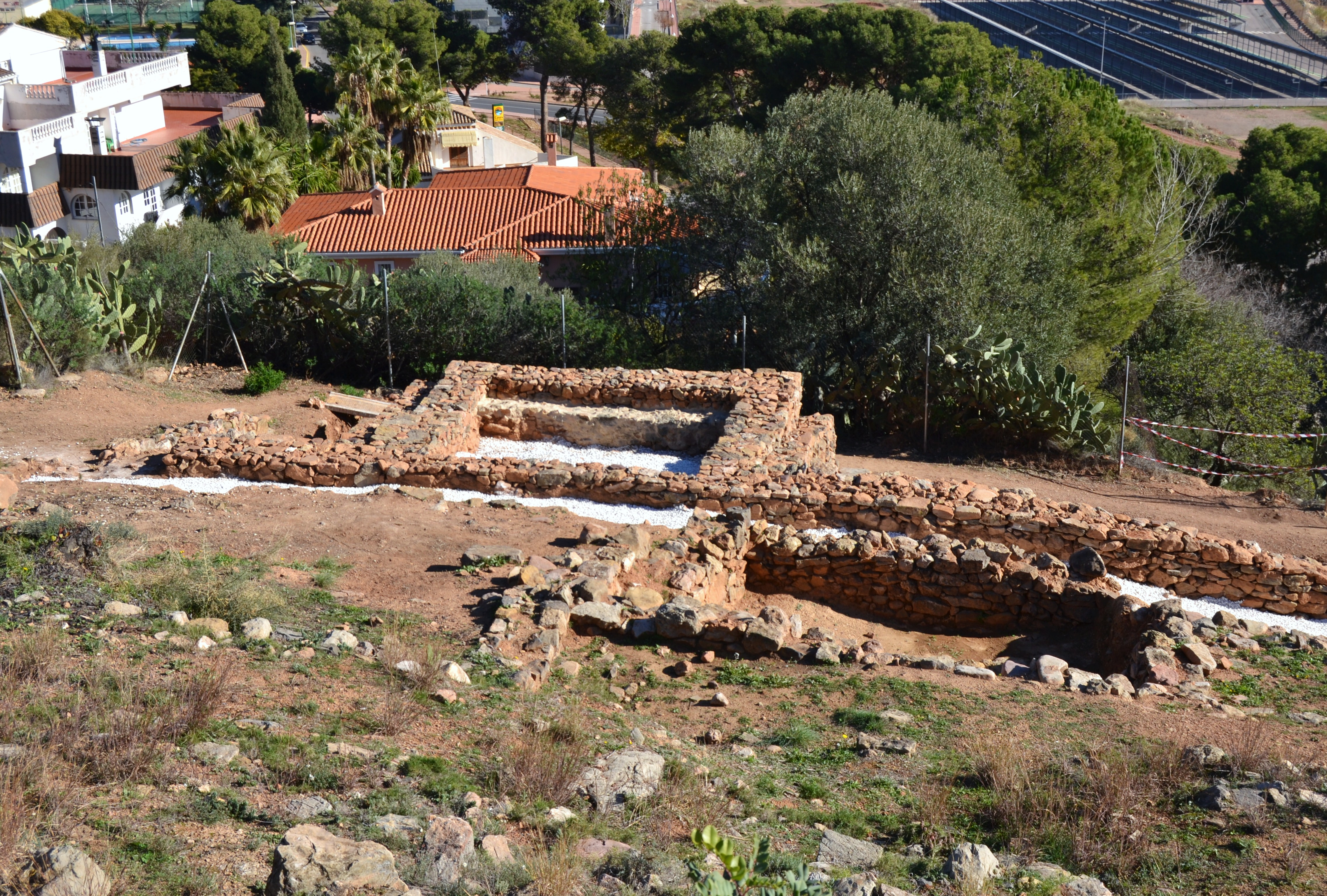 Torre del poblat ibero-romà de Sant Josep, la Vall d'Uixó.